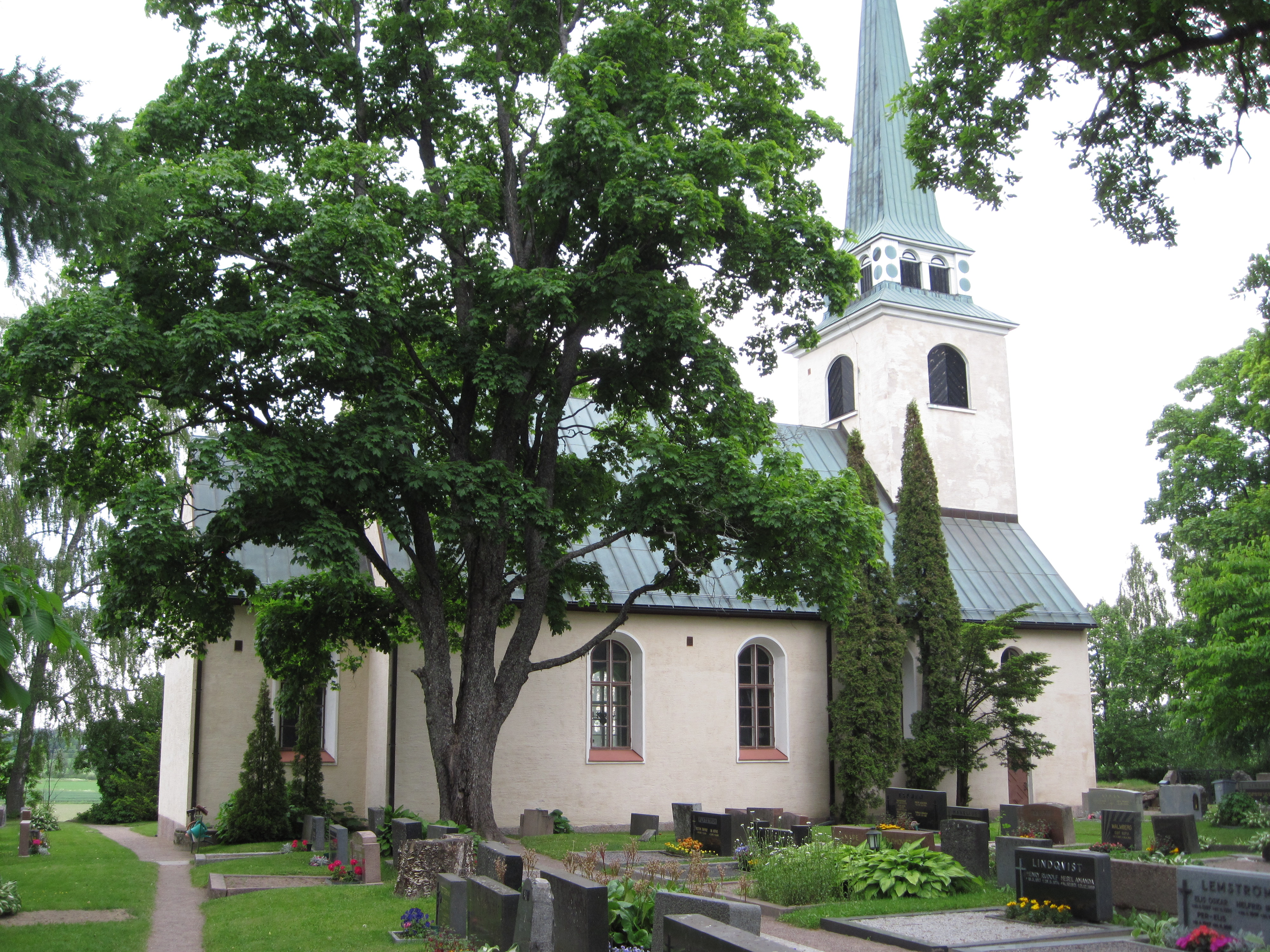 Degerbyn kirkko kesällä 2012